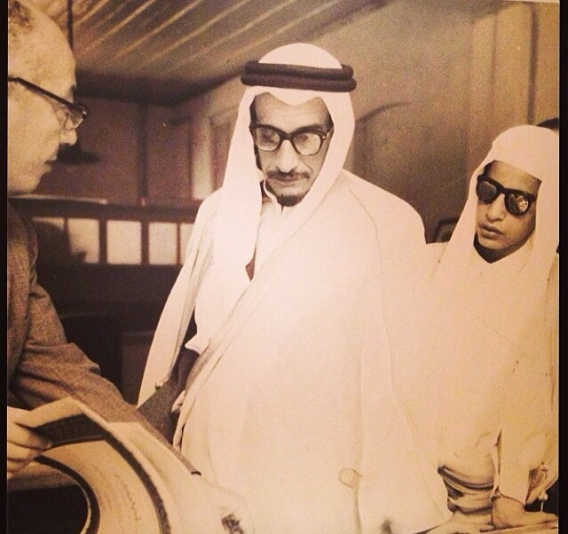 الأمير فهد بن فيصل بن فرحان آل سعود ( في أحد الزيارات )